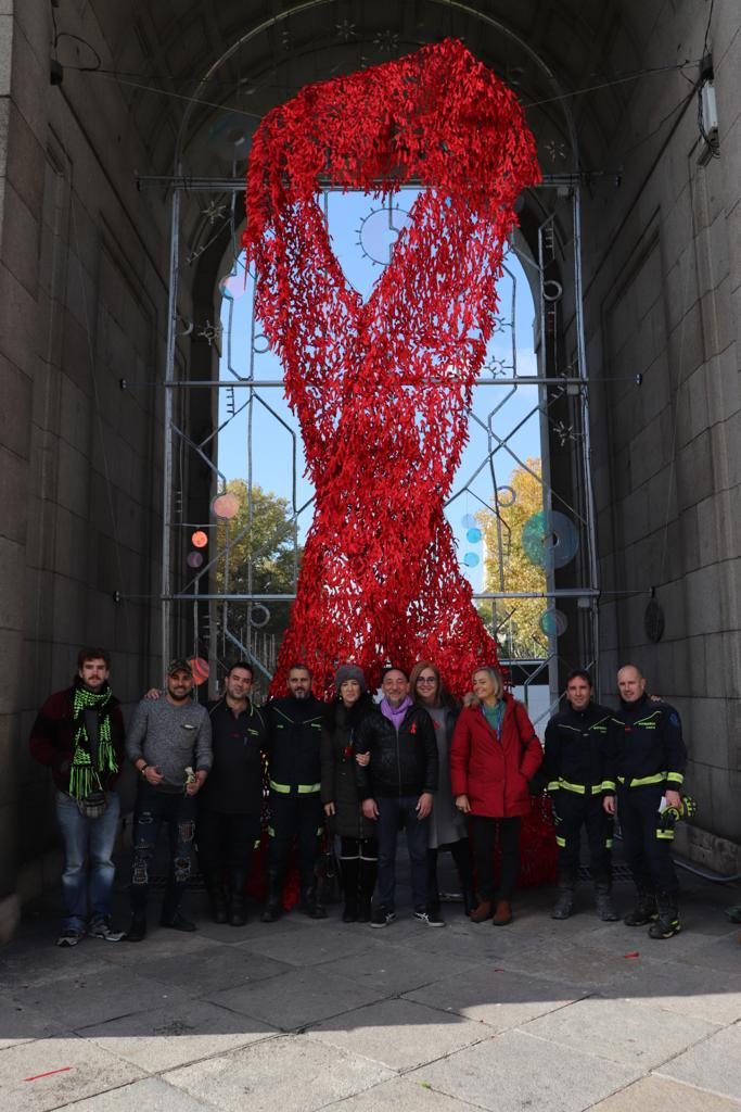 Puesta del Lazo en el día mundial del SIDA 1 de Diciembre en la Puerta de Álcala Madrid. COGAM